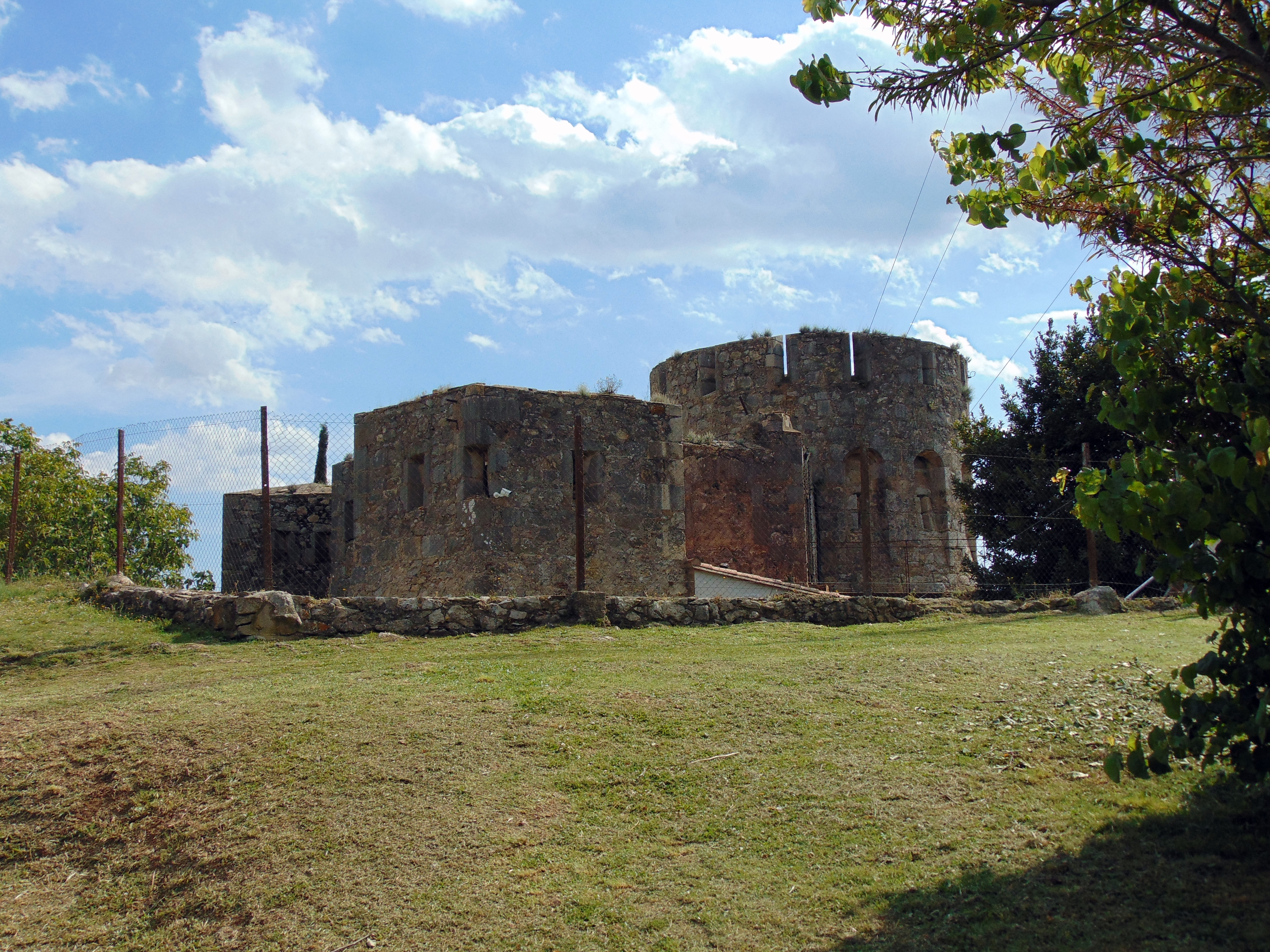 Torre i Dipòsit d'Aigües